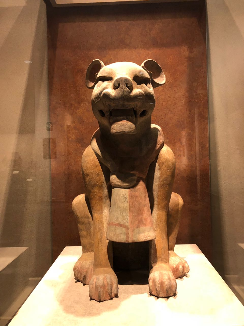 Urna del gran jaguar, pieza zapoteca del preclásico, exhibida en el Museo Nacional de Antropología de la Ciudad de México, México.